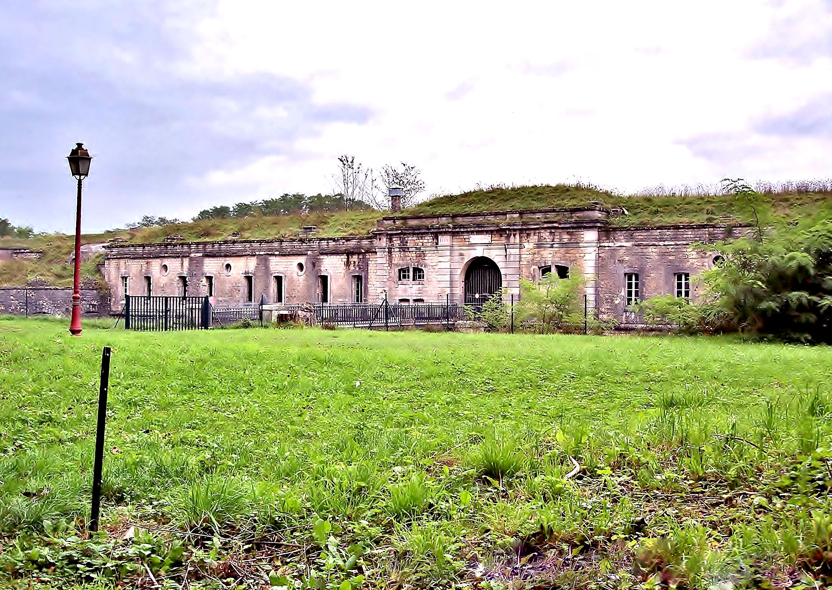 Fort de Sénarmont à Bessoncourt. Territoire de Belfort